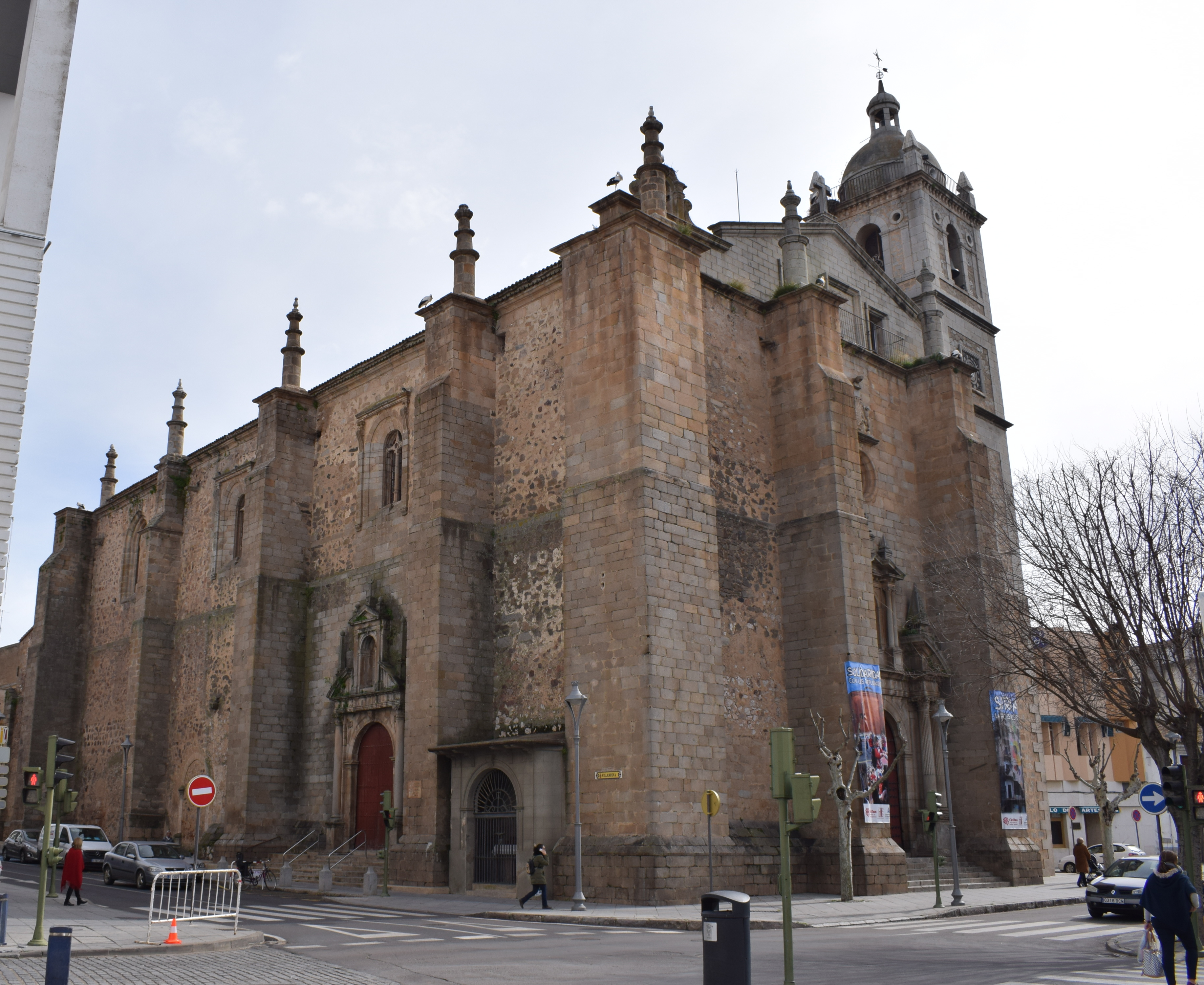 Iglesia Parroquial de Santiago de Don Benito